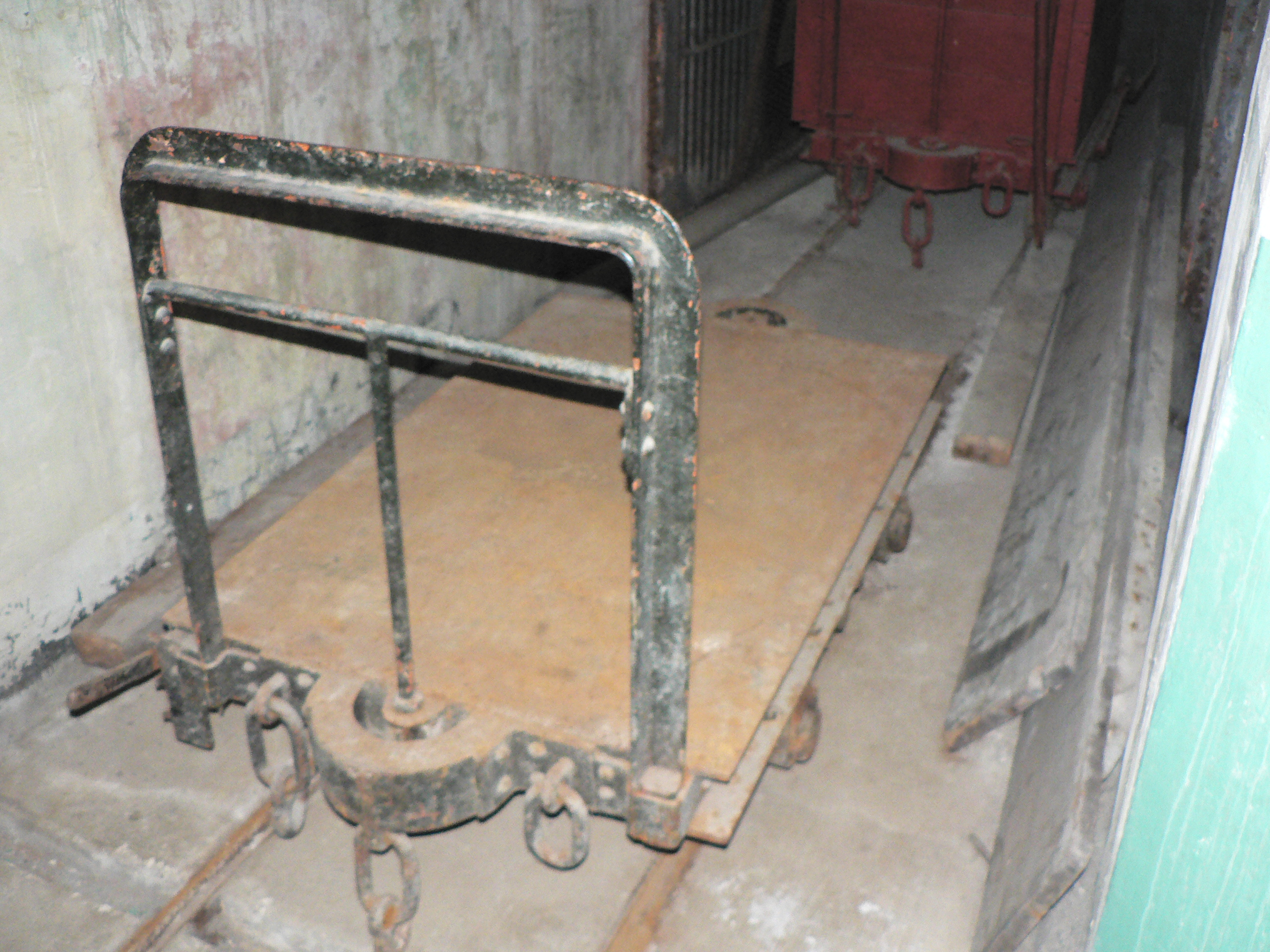 Fort Saint-Gobain, Modane Decauville rail system